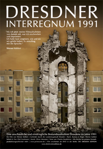 Filmplakat Dresdner Interregnum 1991